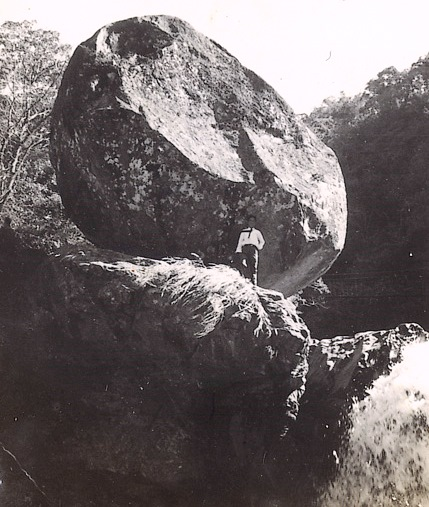 中文（台灣）: 桃園縣復興鄉義盛村